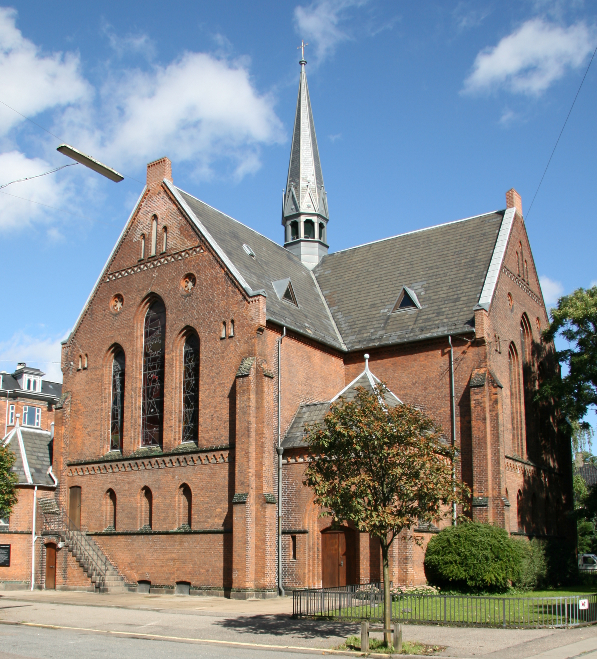 Sankt Thomas Kirke in Copenhagen, Denmark.